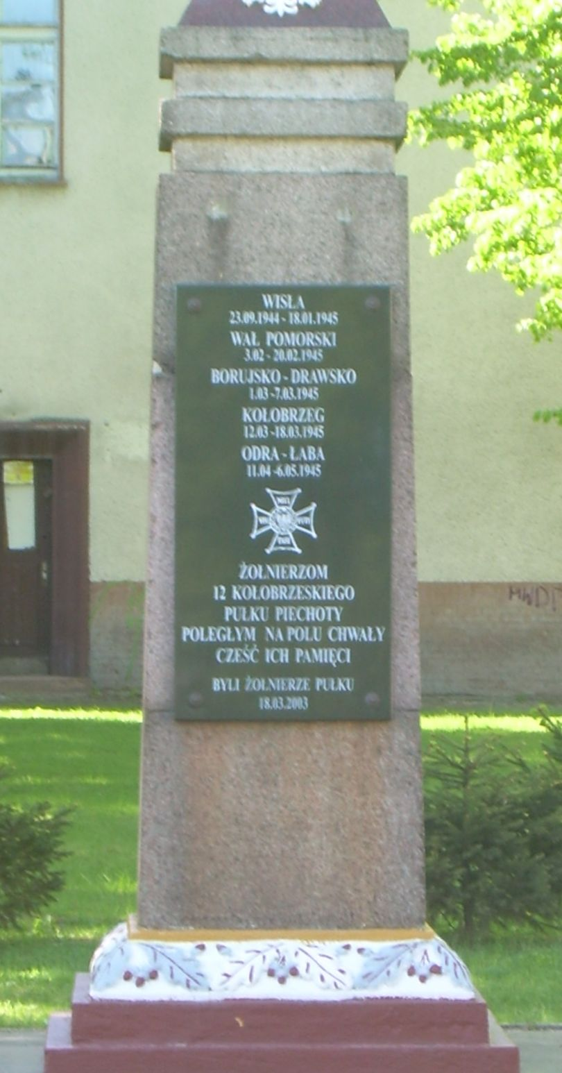 Gorzów Wielkopolski - pomnik przy placu defilad na terenie byłych koszar brygady zmechanizowanej.